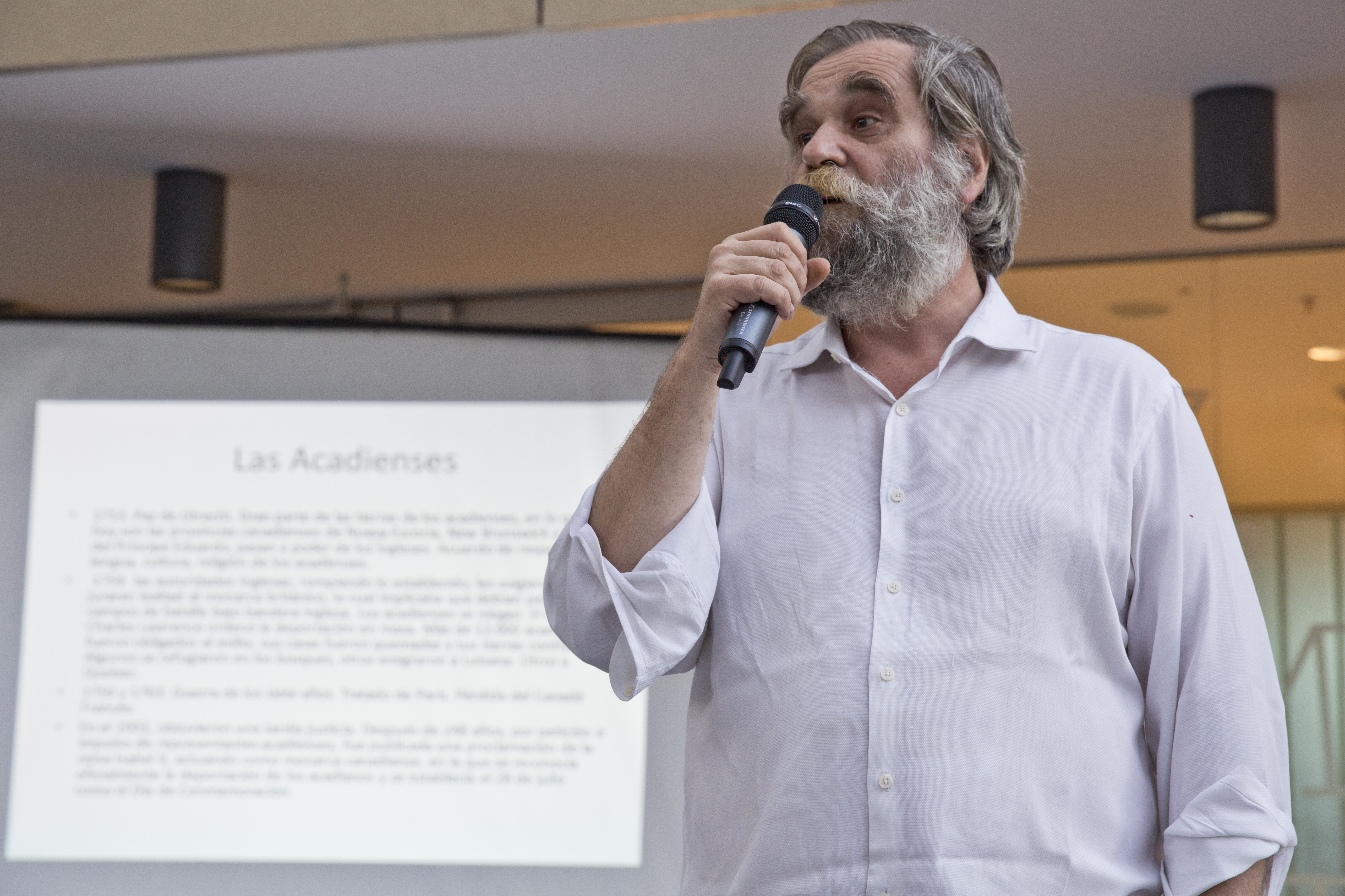 Buenos Aires, 8 de marzo de 2015.- En el marco del Día Internacional de la Mujer, el Museo Malvinas e Islas del Atlántico Sur presentó la muestra de acuarelas “Malvinas, mi casa” que reflejan la vida en Malvinas en el siglo XIX. Las obras están basadas en el “Diario de 1829 en Malvinas” de la cronista María Sáez de Vernet, escrito durante su estadía en las Islas. Además, Marcelo Vernet, descendiente de María Sáez de Vernet, y María Fernanda Cañás, quien fue maestra en Malvinas, brindó una charla sobre las mujeres que cumplieron un rol destacado en la historia de las Islas. Para culminar la velada, se realizó un show musical a cargo del poeta, músico y ex combatiente Martín Raninqueo, quien se presentó junto a Diego Rolón en guitarra y Potolo Abrego en percusión. Foto: Augusto Starita / Ministerio de Cultura de la Nación. Buenos Aires, 8 de marzo de 2015.- En el marco del Día Internacional de la Mujer, el Museo Malvinas e Islas del Atlántico Sur presentó la muestra de acuarelas “Malvinas, mi casa” que reflejan la vida en Malvinas en el siglo XIX. Las obras están basadas en el “Diario de 1829 en Malvinas” de la cronista María Sáez de Vernet, escrito durante su estadía en las Islas. Además, Marcelo Vernet, descendiente de María Sáez de Vernet, y María Fernanda Cañás, quien fue maestra en Malvinas, brindó una charla sobre las mujeres que cumplieron un rol destacado en la historia de las Islas. Para culminar la velada, se realizó un show musical a cargo del poeta, músico y ex combatiente Martín Raninqueo, quien se presentó junto a Diego Rolón en guitarra y Potolo Abrego en percusión.